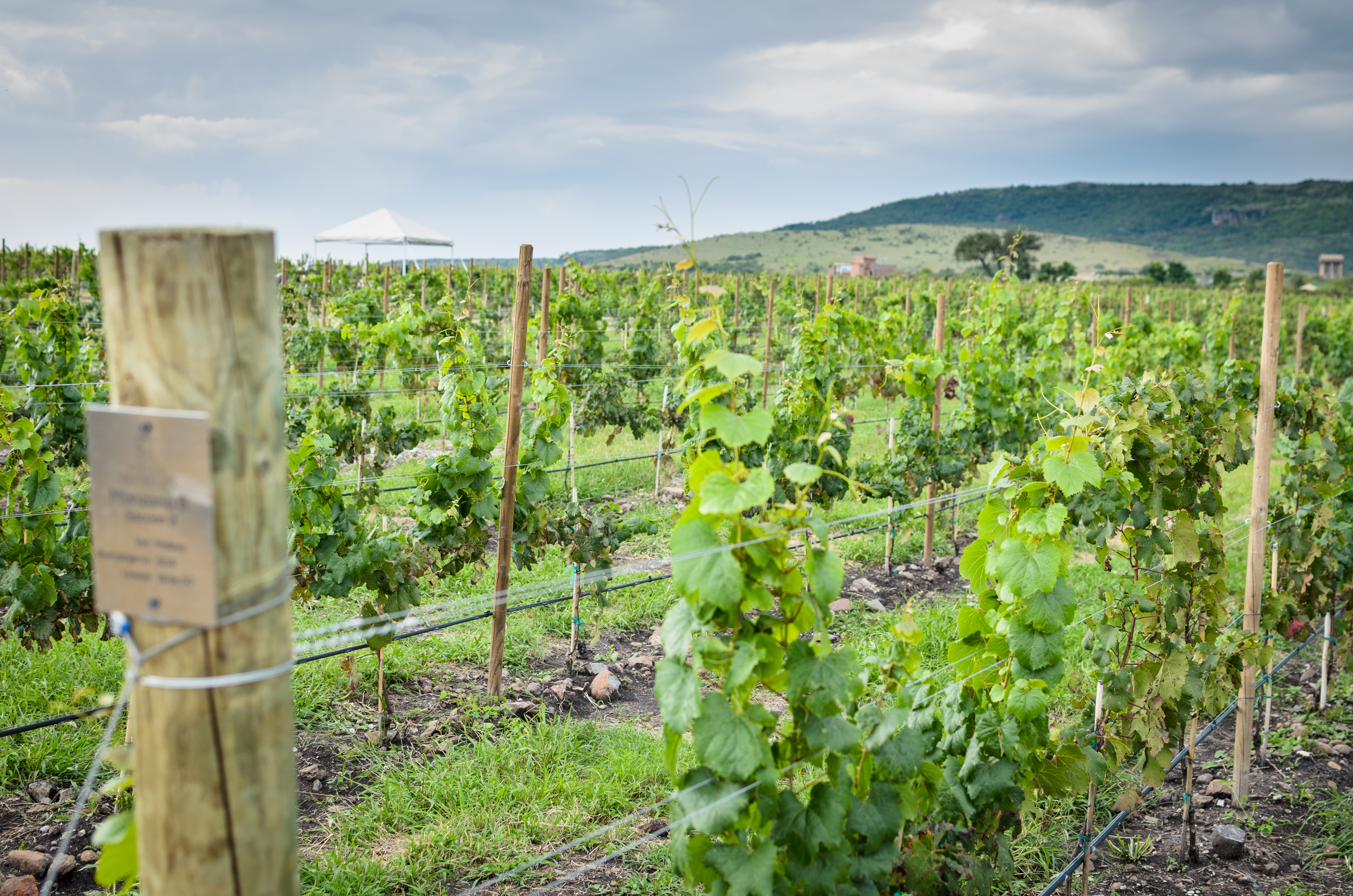 Celebración de la primera cosecha en los Viñedos San Miguel el sábado 27 de agosto del 2016 en San Miguel de Allende, Guanajuato.